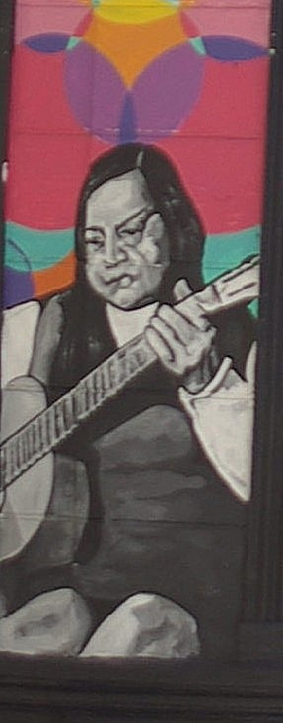 Grafiti de Hilda Parra pintado por Matiz en la fachada del restaurante La Casona de Hilda Parra (Ernesto Pinto Lagarrigue 90) en la esquina SW de esta calle con Dardignac, barrio Bellavista, Santiago de Chile.